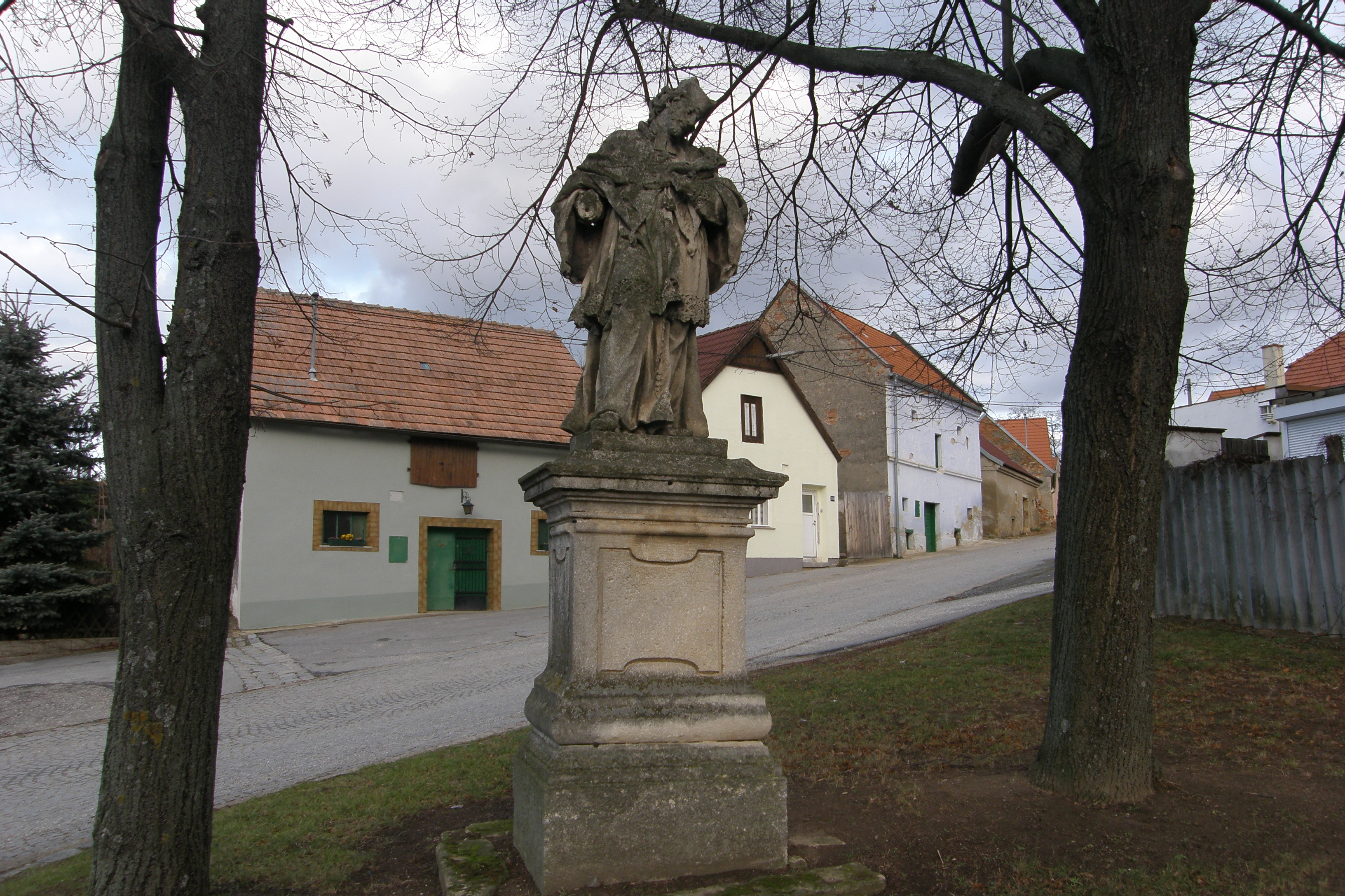 Figurenbildstock hl. Johannes Nepomuk, Hausbrunn